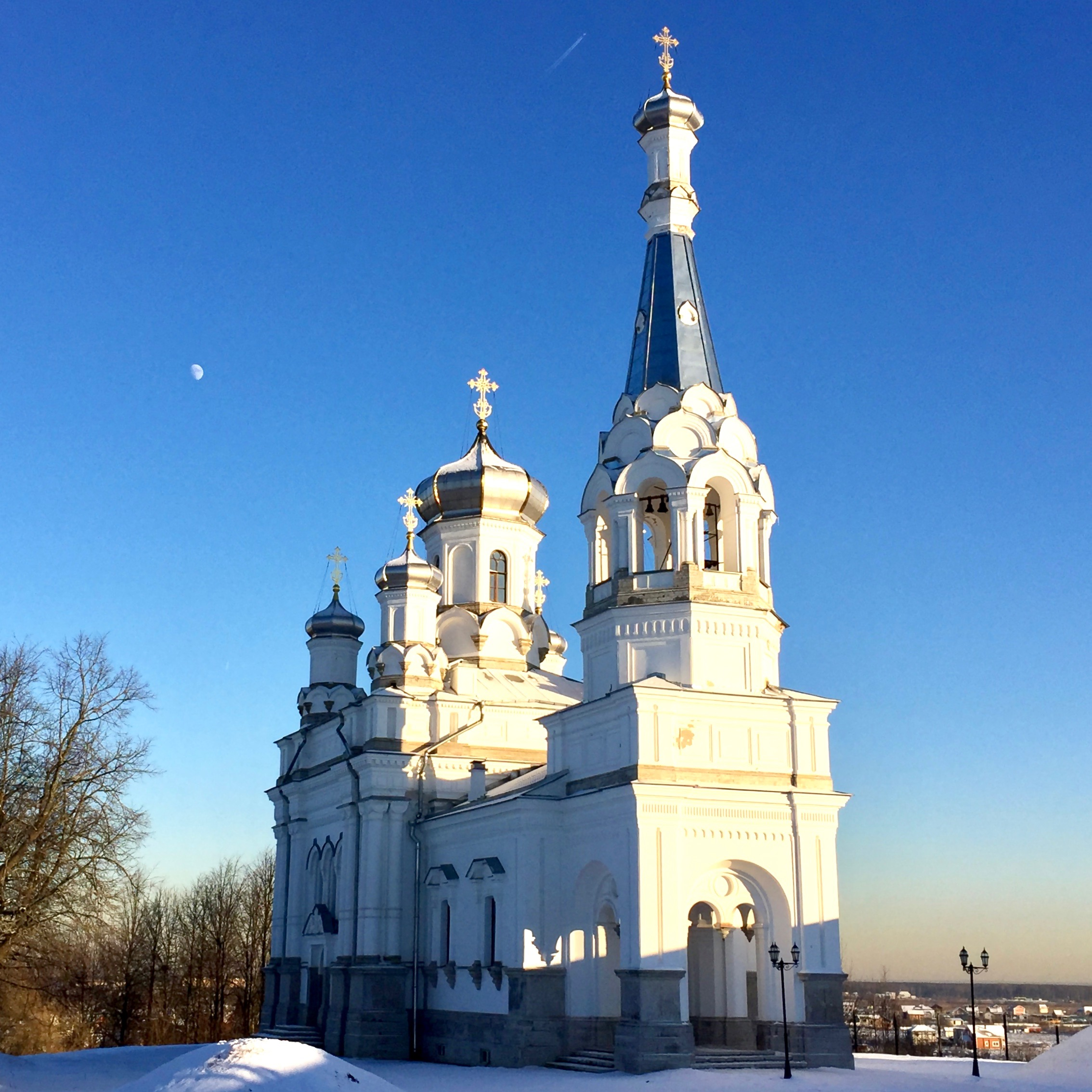 Церковь святой Александры